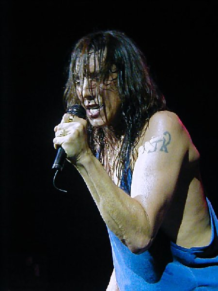 Jeff Keith, Sänger der Rockband TESLA